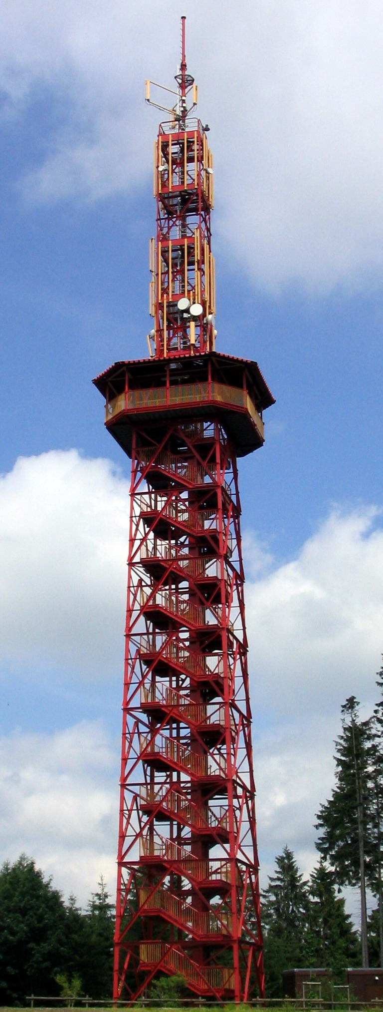 Stüppelturm at Fort Fun Abenteuerland, Bestwig, Germany